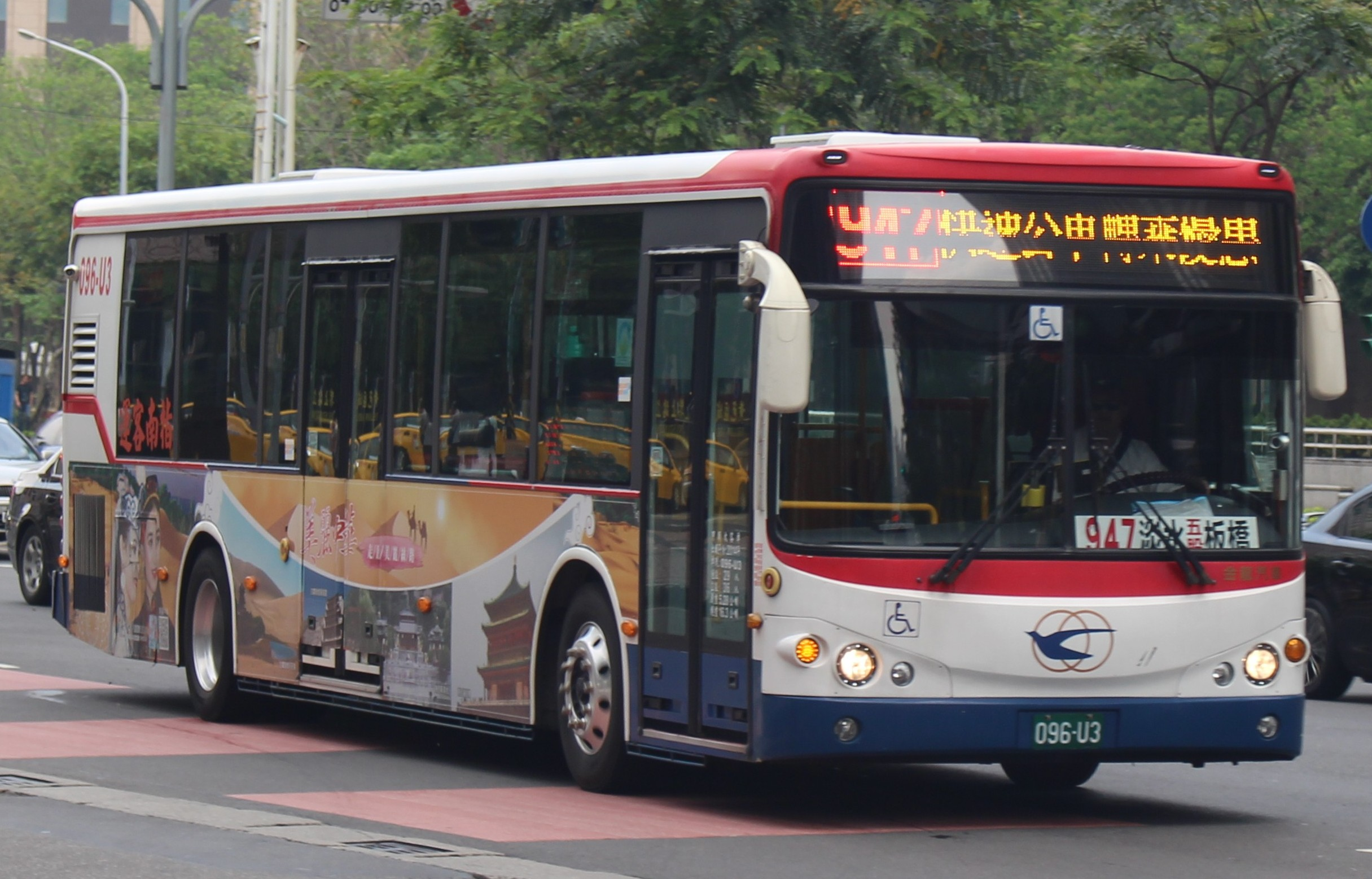 指南客運 096-U3 947